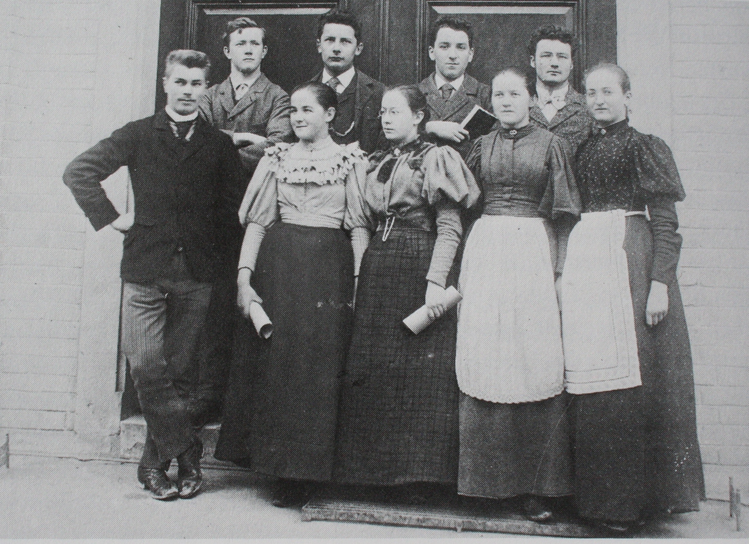 Klasse der Kantonsschule Küsnacht 1890